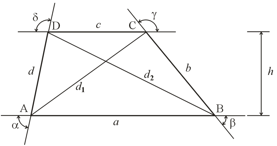 Author: Michael Angelkovich